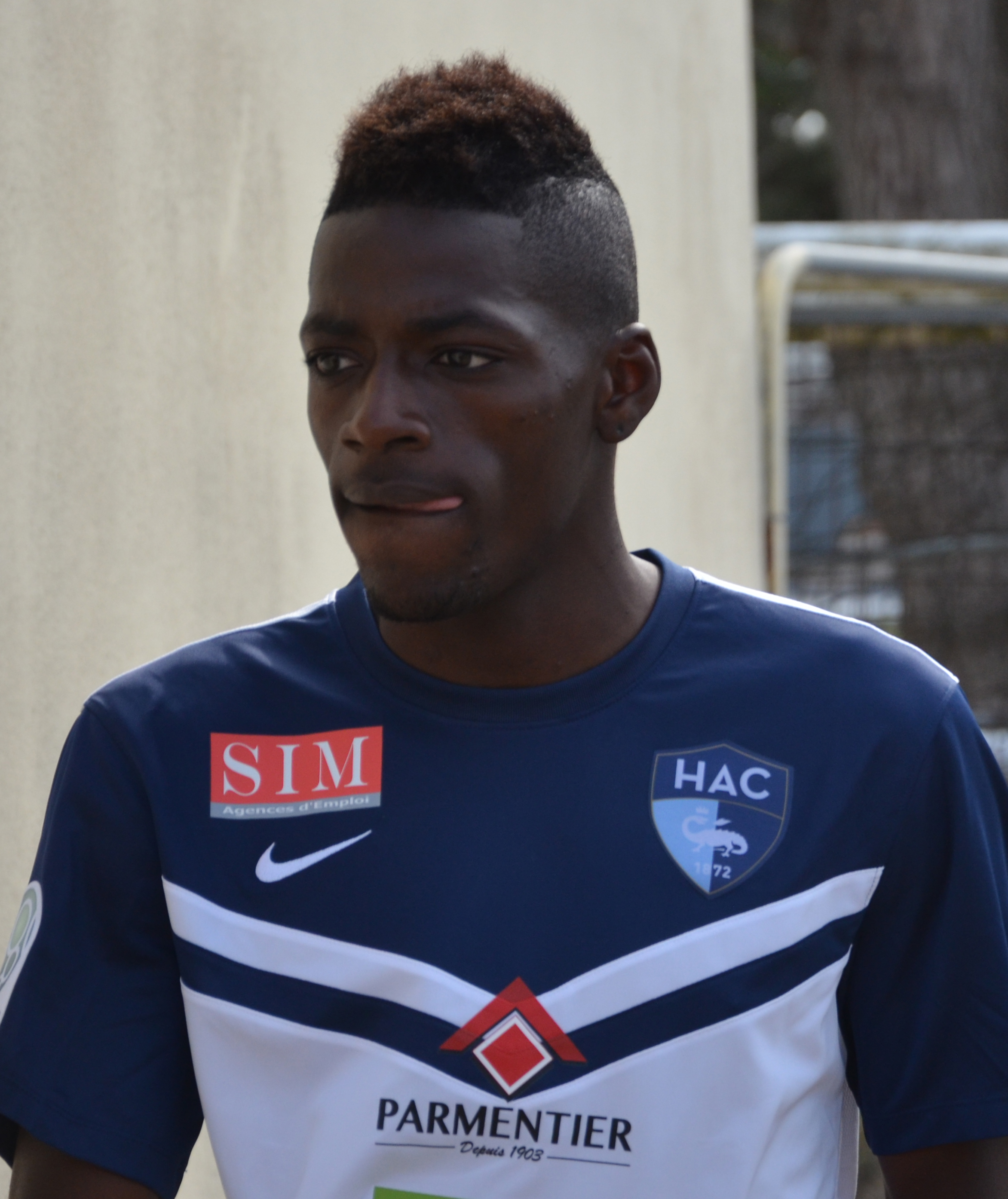 Photographie prise lors du match opposant le Stade rennais au Havre AC en amical au stade Paul-Audrin de Dinard le 8 juillet 2015. Ici, Harrison Manzala.